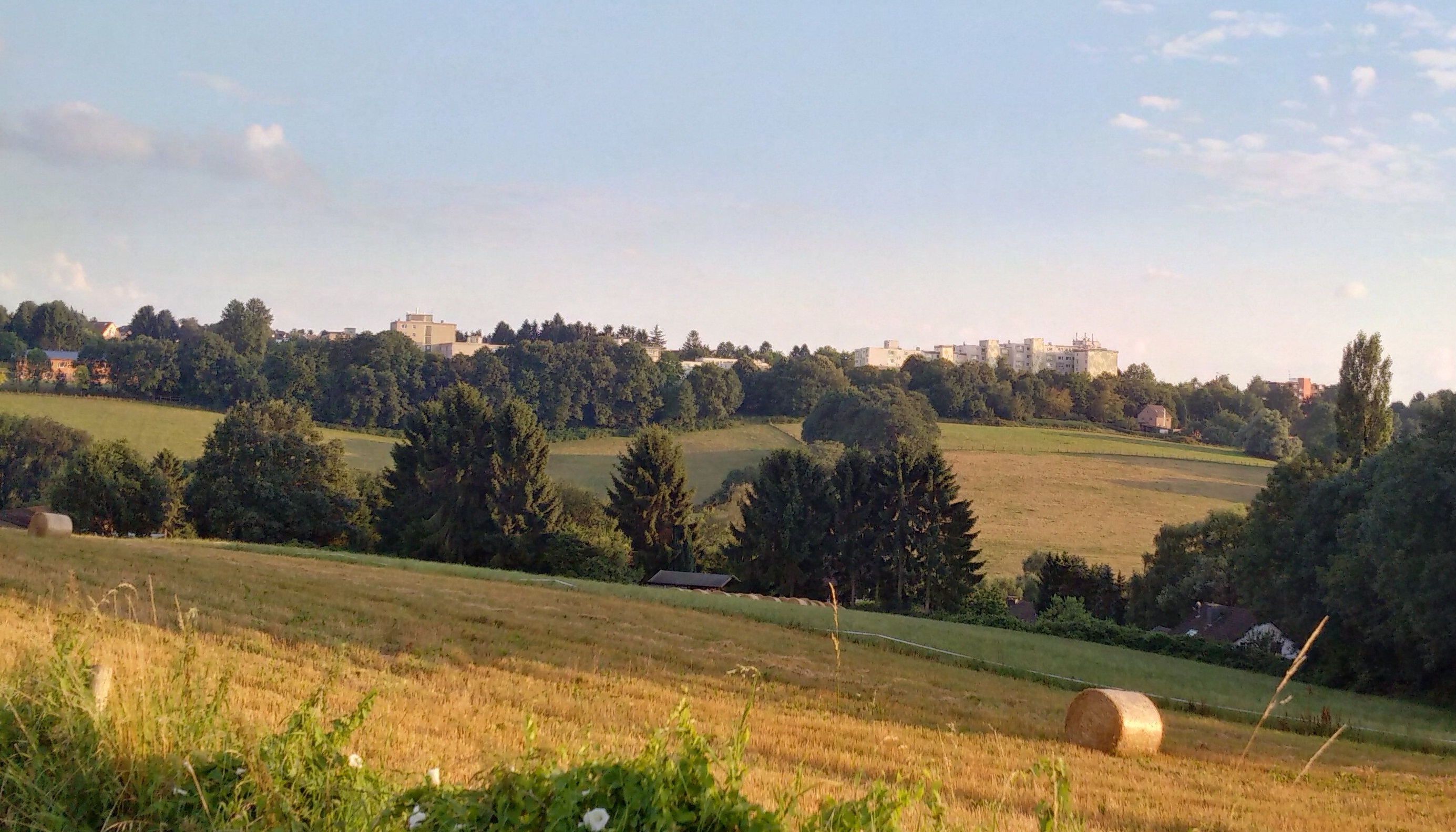 Blick auf Apfelbaum und Fuhr in Solingen, aufgenommen im Sommer 2016